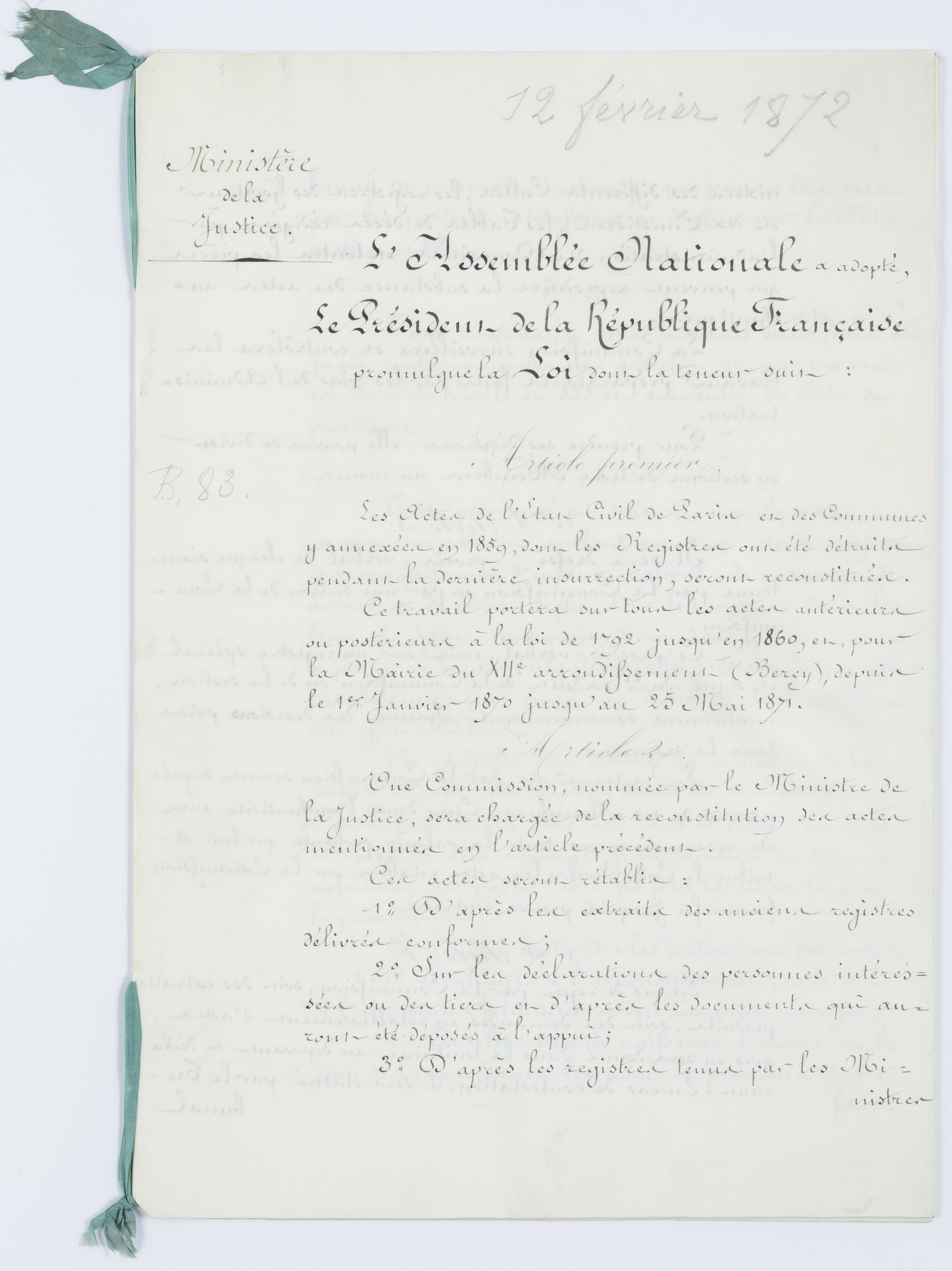 Loi du 12 février 1872 sur l'état civil parisien Page 1